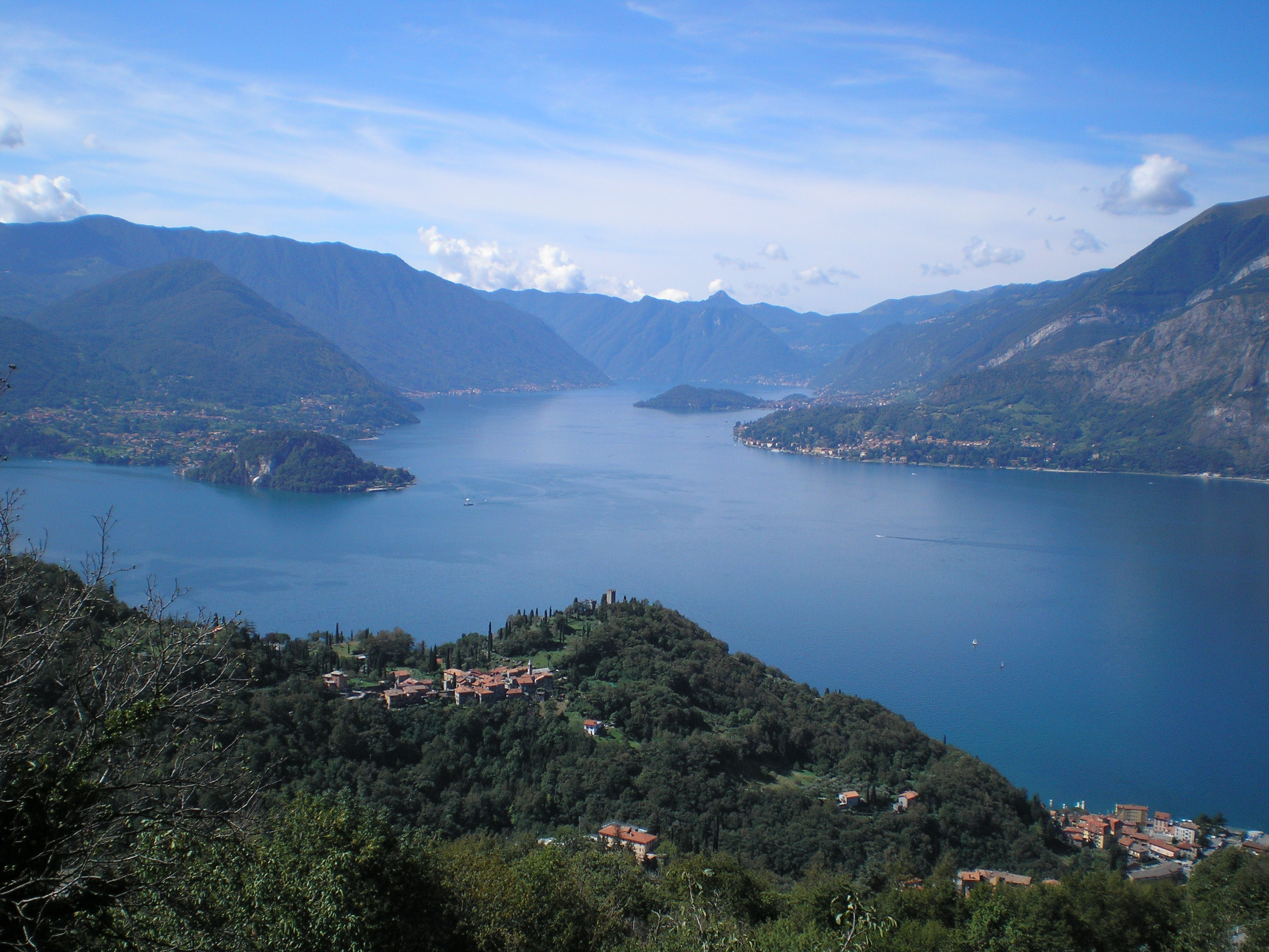 Panorama da Bolognina, i due rami del lago di Como.